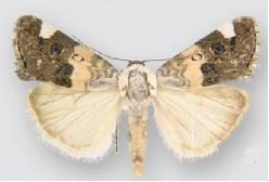 Acontia areli male